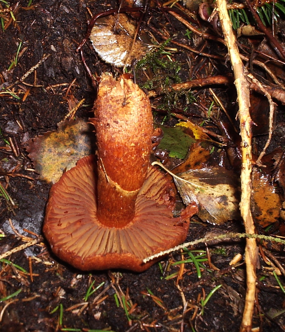 Esemplare di C.speciosissimus.